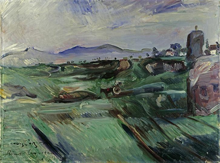 Das Gemälde Römische Campagna malte Lovis Corinth in Öl auf Leinwand in den Maßen 71,5 x 96 cm. Vor der Machtergreifung durch die Nationalsozialisten gehörte es in die private Sammlung des Direktors der staatlichen Kunstbibliothek Berlin, Curt Glaser (1879 - 1943). Auch Glaser war mittels des „Gesetzes zur Wiederherstellung des Berufsbeamtentums" aus dem Amt entlassen worden und veräußerte schließlich große Teile seines Hab und Gut, um seine Emigration aus Nazideutschland zu finanzieren, darunter auch die Römische Campagna. Das Ölgemälde war ein Objekt der am 9. Mai 1933 als „Sammlung und Bibliothek eines Berliner Kunstfreundes" über die Internationale Kunst- und Auktionshaus GmbH in Berlin versteigerten Gegenstände. Vor 1945 gelangte es in die Sammlung von Conrad Doebbeke aus Berlin. Dieser verkaufte das Werk - gemeinsam mit mehr als 100 anderen Werken großteils ungeklärter Herkunft (Provenienz) - im Jahr 1949 an die Stadt Hannover. Seit 1950 befand sich das Gemälde als Dauerleihgabe der Stadt in der Landesgalerie des Niedersächsischen Landesmuseums Hannover. Nachdem der Rat der Stadt Hannover das Gemälde als NS-verfolgungsbedingt entzogenes Kunstwerk im Sinne der Washingtoner Erklärung eingestuft hatte, wurde es am 24. September 2007 an die Erben des früheren Eigentümers restituiert ...